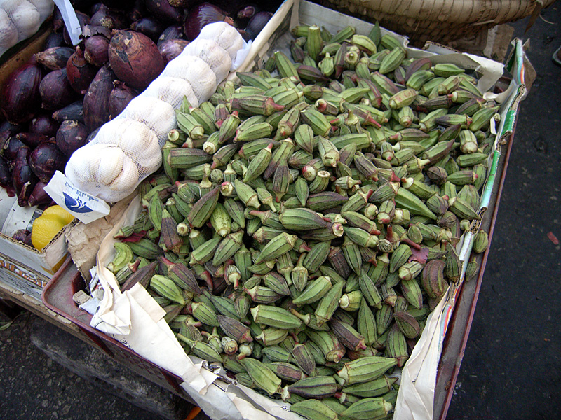 Okra auf dem Obst- und Gemüsemarkt, Kairo, Taufiqiya St.